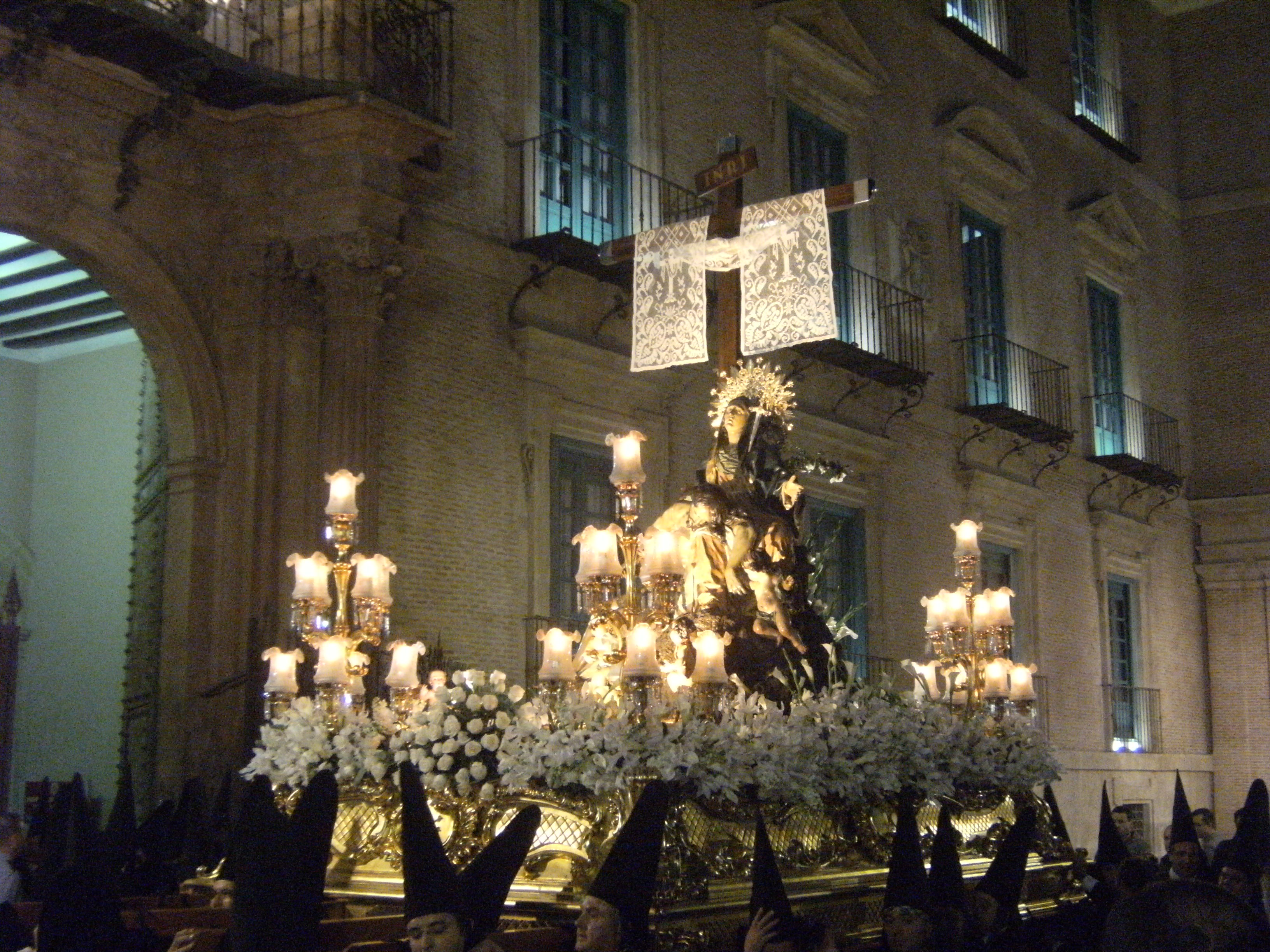 Paso de la Santísima Virgen de las Angustias, titular de la Cofradía de los Servitas de Murcia (Región de Murcia, España). Es obra de Francisco Salzillo, realizada en 1746.